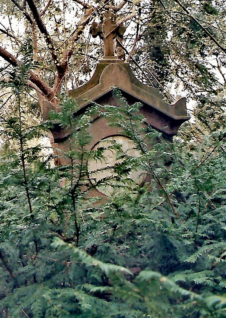 Zugewachsenes Grab des Hanseatischen Gesandten